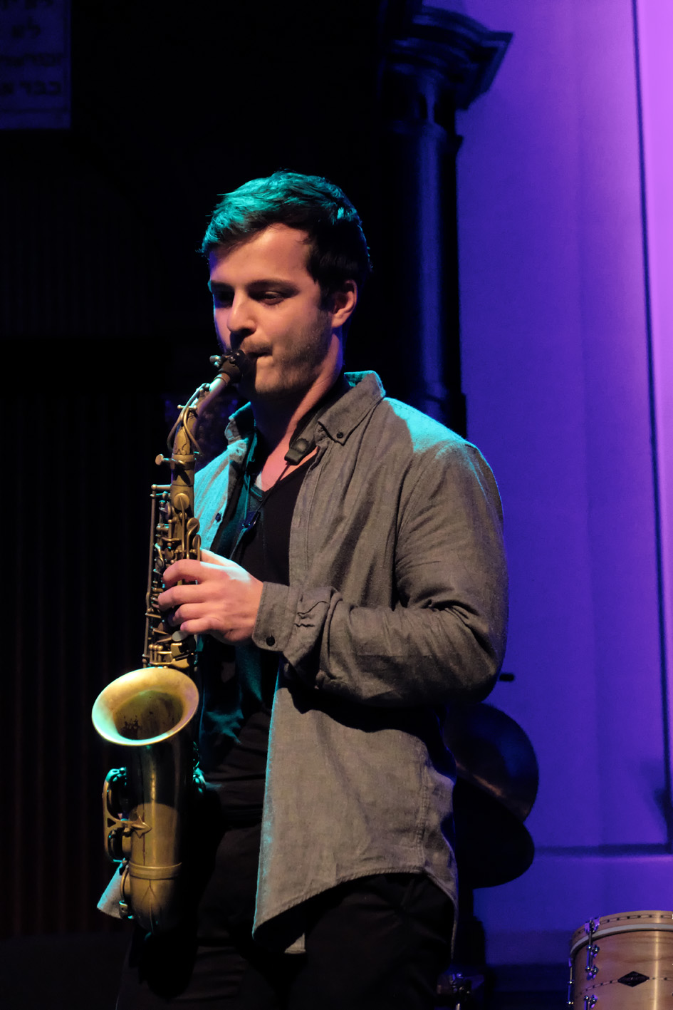 Ben van Gelder